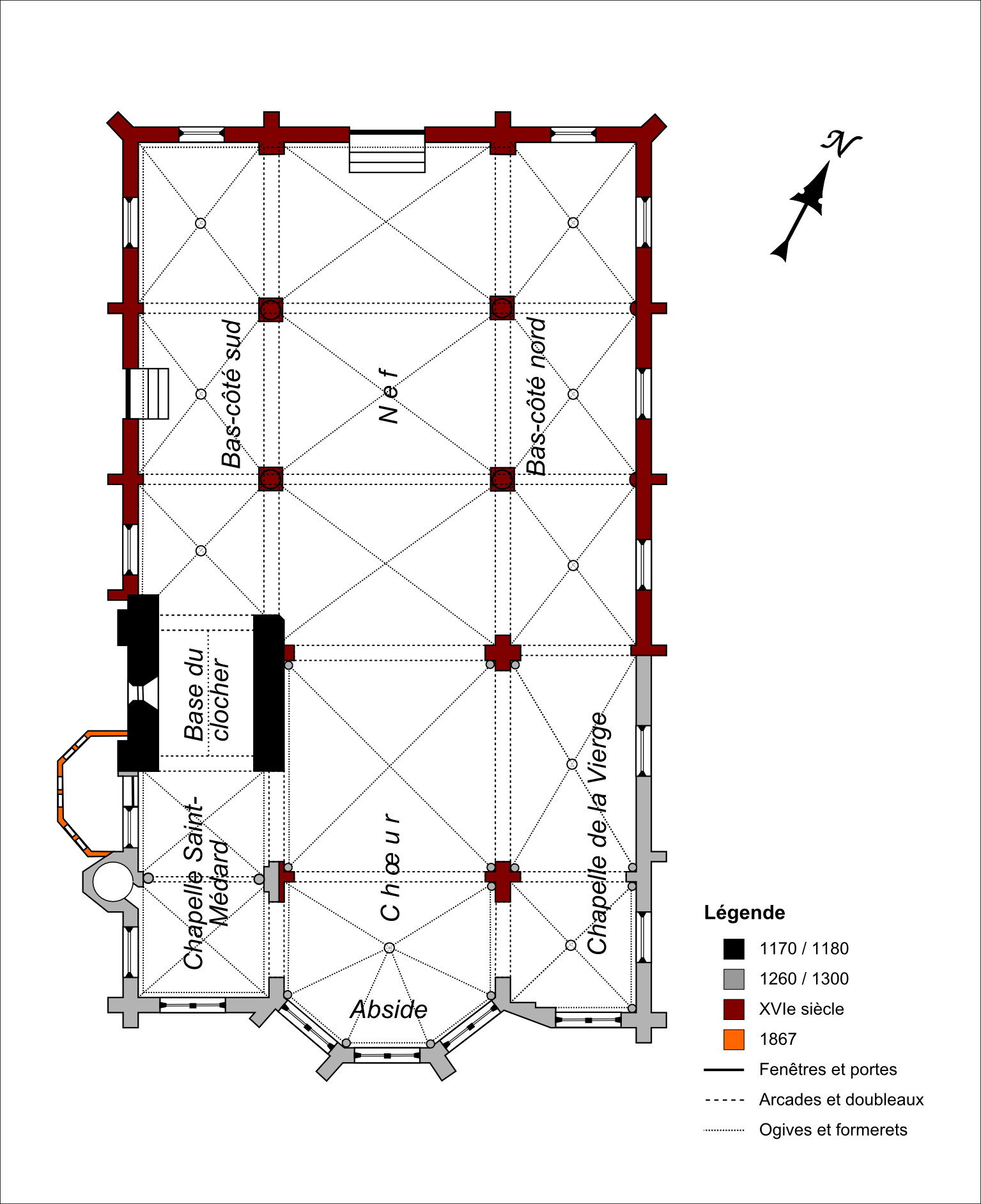 Plan schématique de l'église. Sans échelle ; en l'absence d'un plan précis pouvant servir de modèle, tous les angles ont été supposés d'être droits. Proportions générales d'après le cadastre.